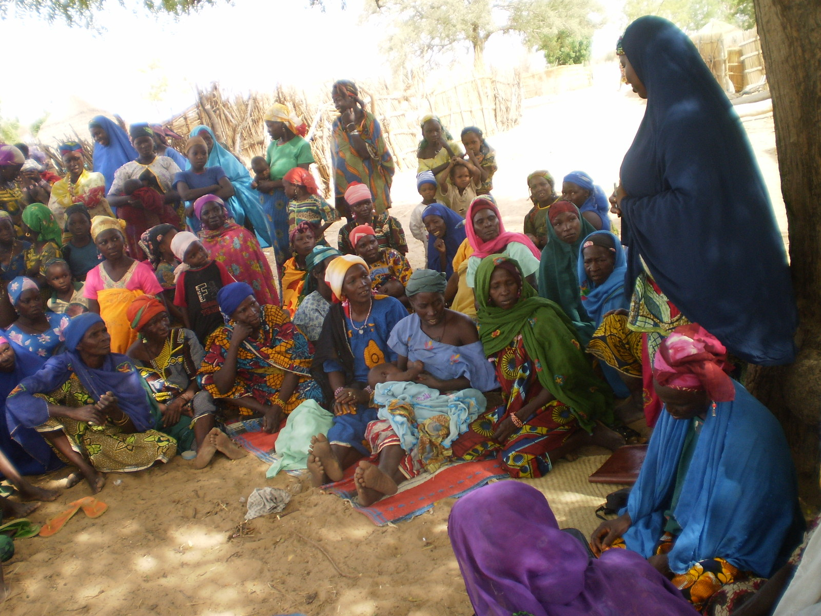 Photo juin 505